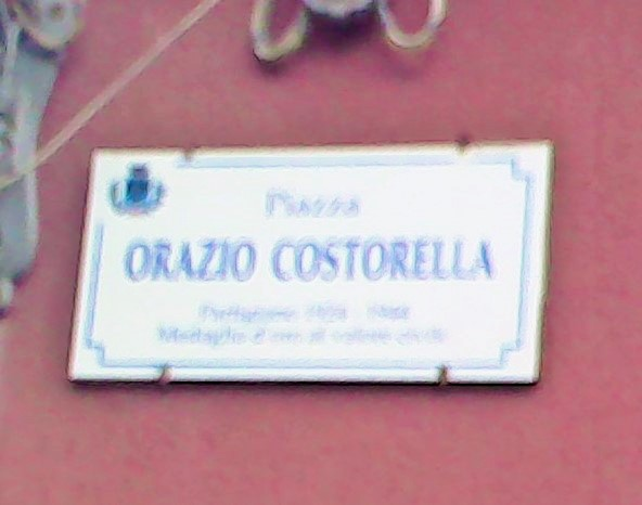 Targa indicativa della piazza intitolata a Orazio Costorella a Misterbianco.